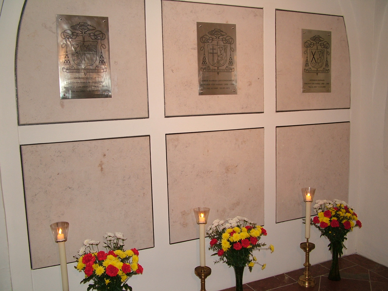 Grab der Passauer Bischöfe Ow-Felldorf, Landersdorfer und Hofmann; Bischofsgruft im Passauer Dom